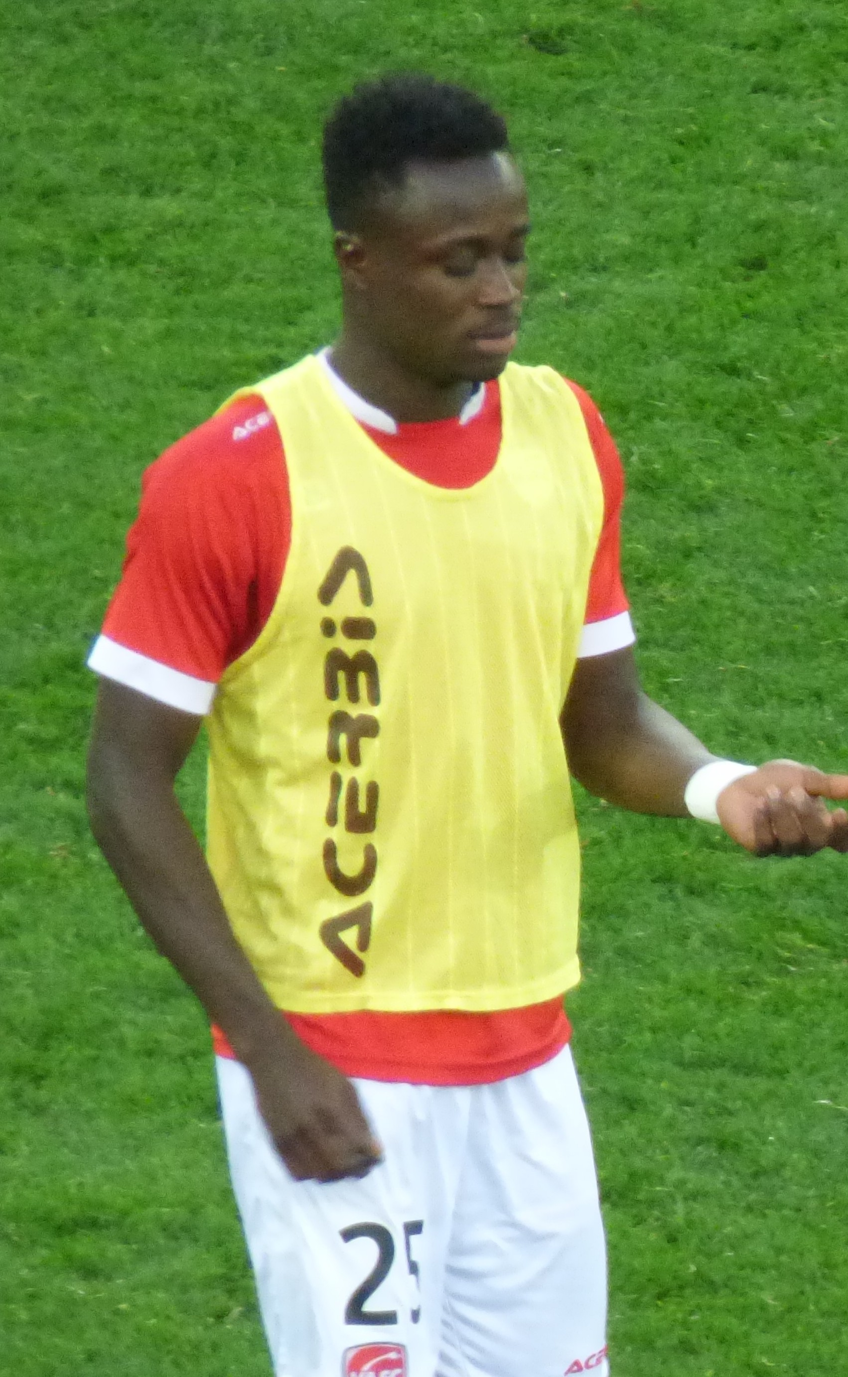 Emmanuel Ntim après le match Valenciennes FC / RC Lens, comptant pour la quatorzième journée du championnat de France de Ligue 2 2018-2019, le 10 novembre 2018, au Stade du Hainaut.